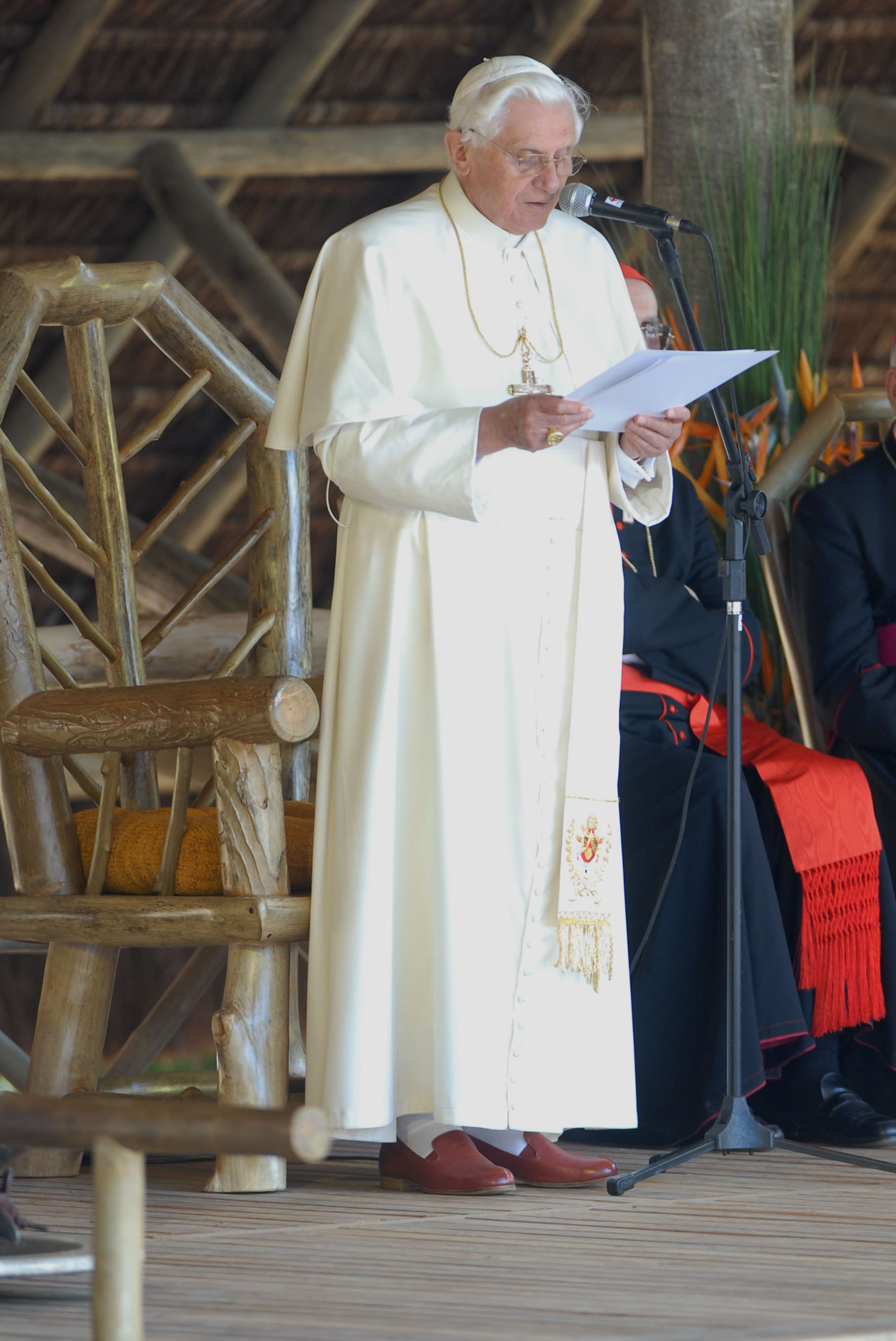 Papa Bento XVI visita a "Fazenda Esperança", local de recuperação de dependentes químicos localizado na zona rural de Guaratinguetá, São Paulo, Brasil.